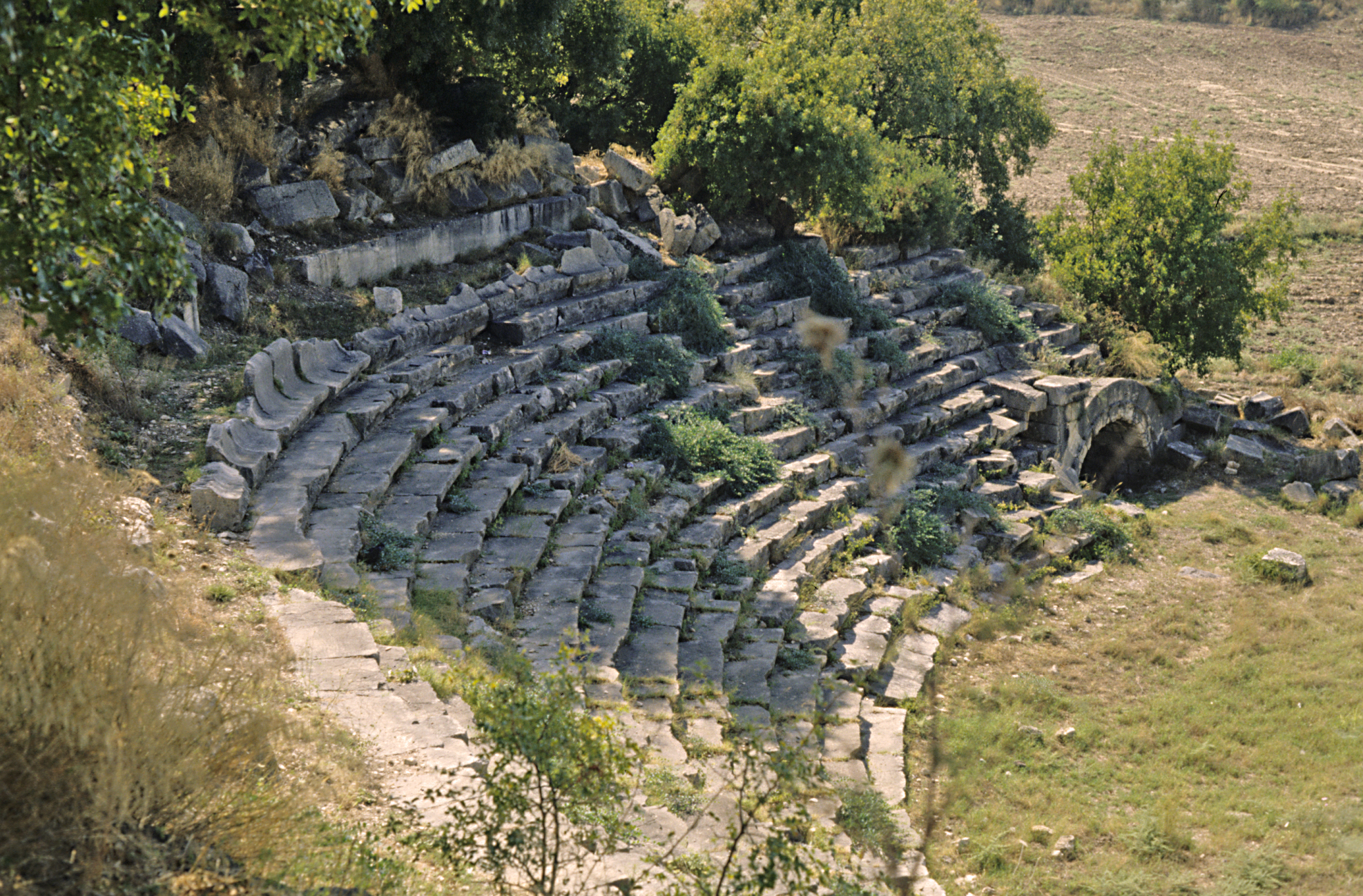 Antike Stadt Hierapolis Castabala bei Osmaniye, Südtürkei, Theater